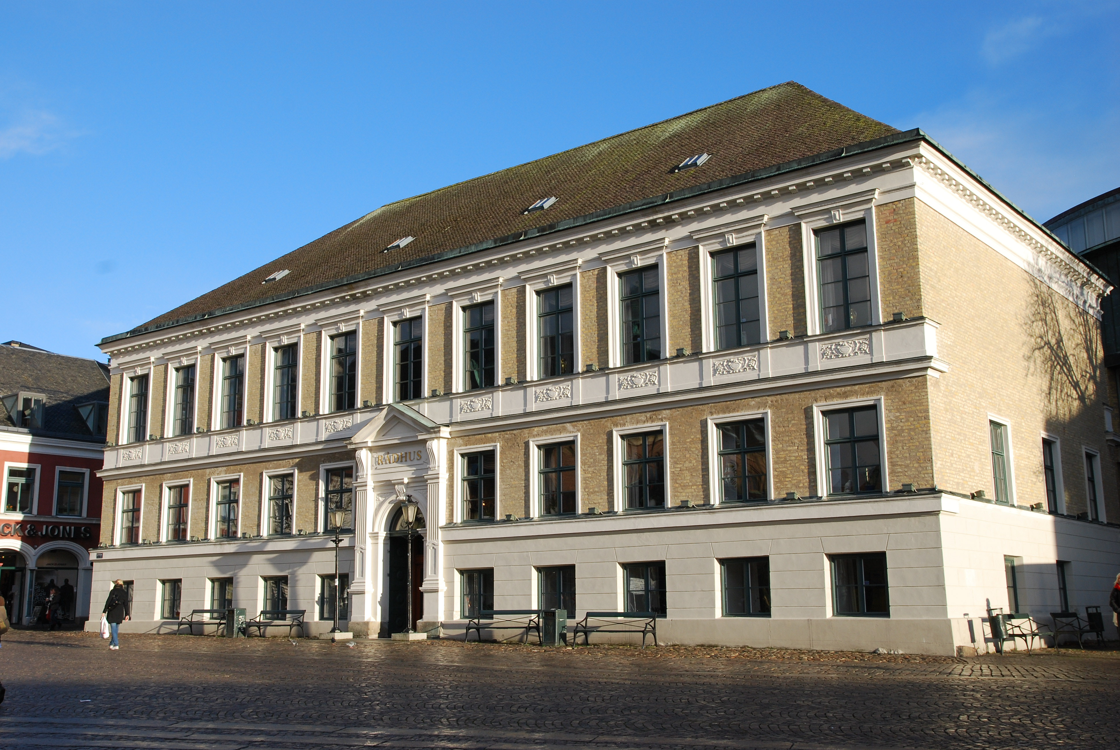 Rådhuset i Lund